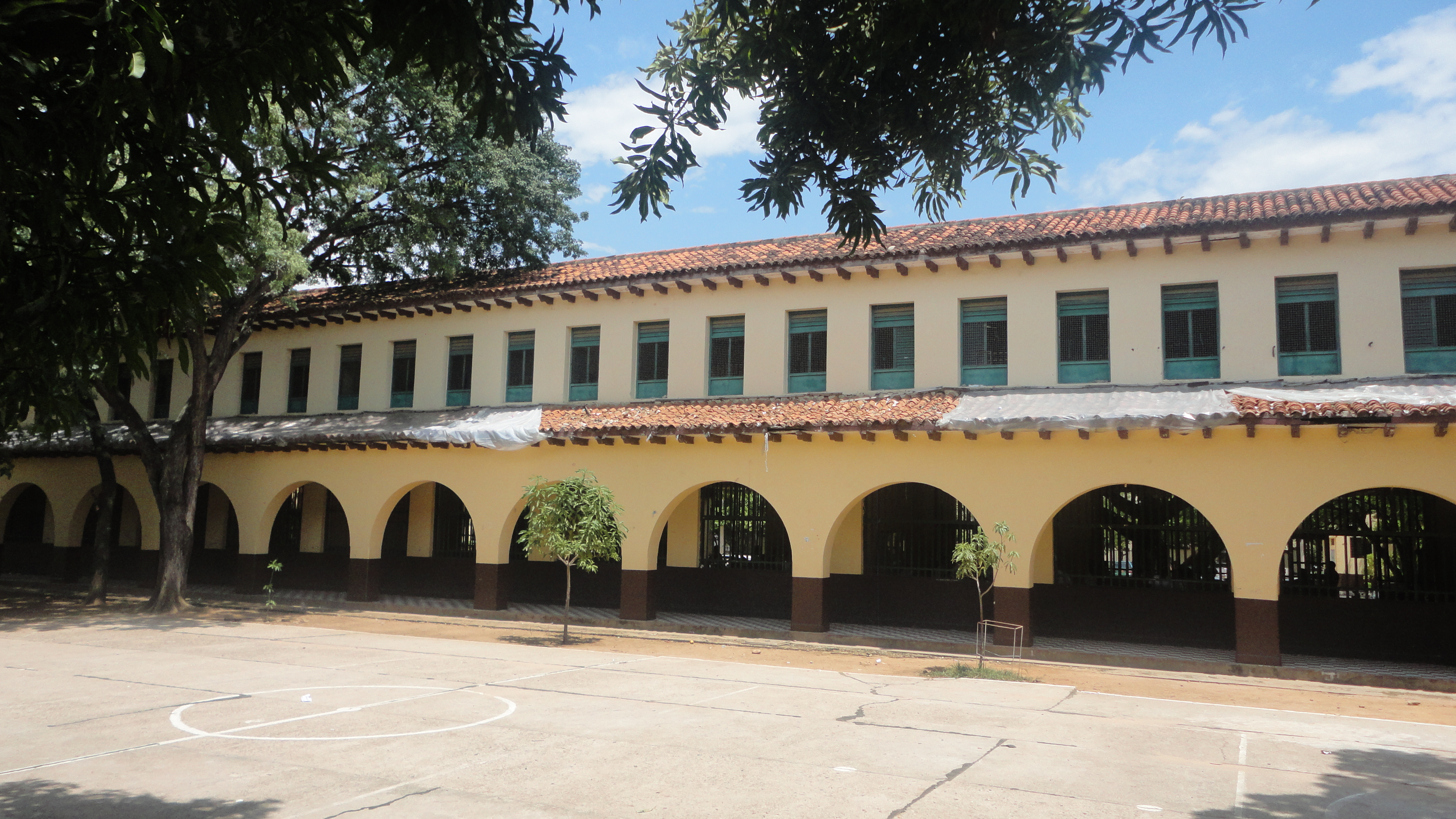 Colegio Nacional Loperena